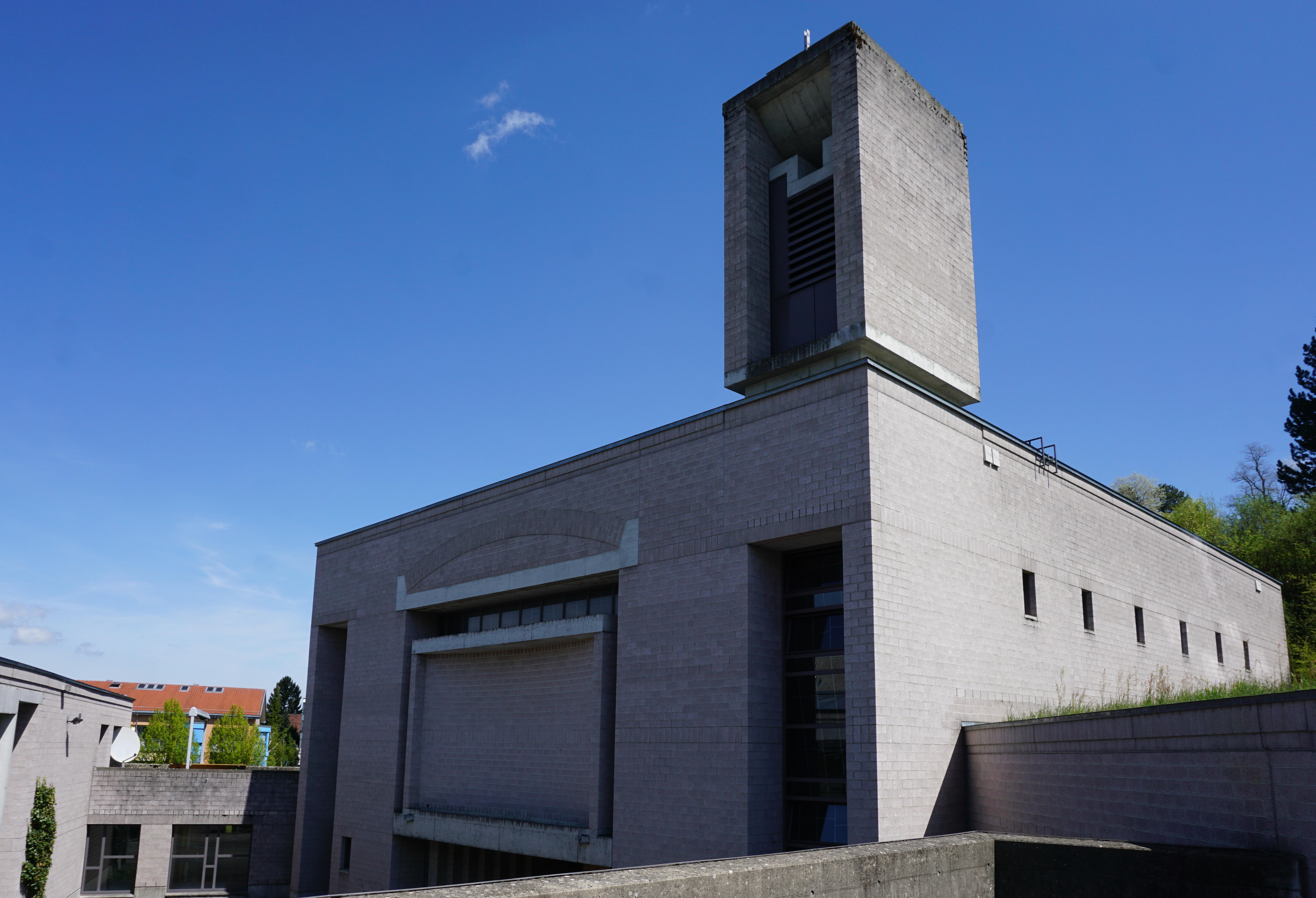 St. Josef, Ecke mit Glockenträger